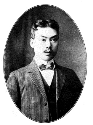 中華民國國會議員